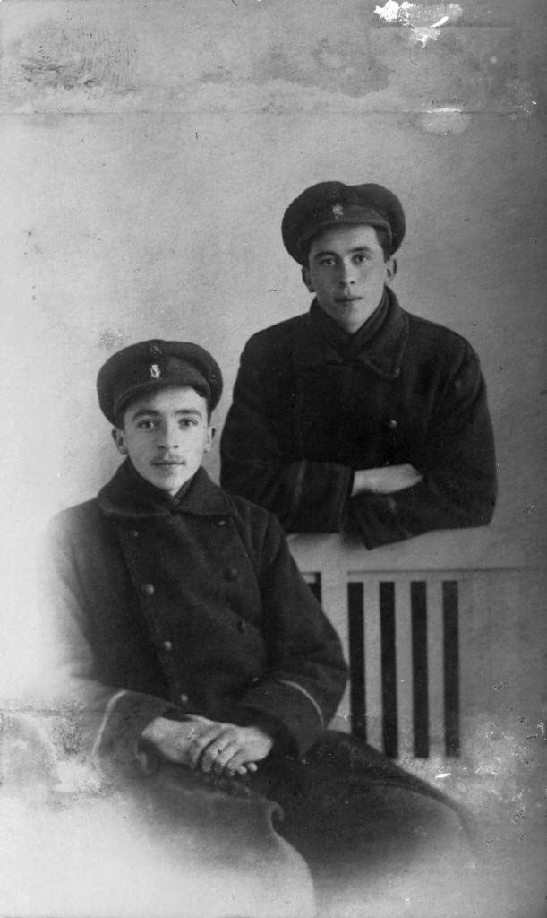 Gebroeders van Raemdonck (Edward en Frans Van Raemdonck) in maart 1916 op verlof in Brighton. De bron vermeldt dat de Belgische censuur de regimentsnummers op de kepi's heeft verwijderd.